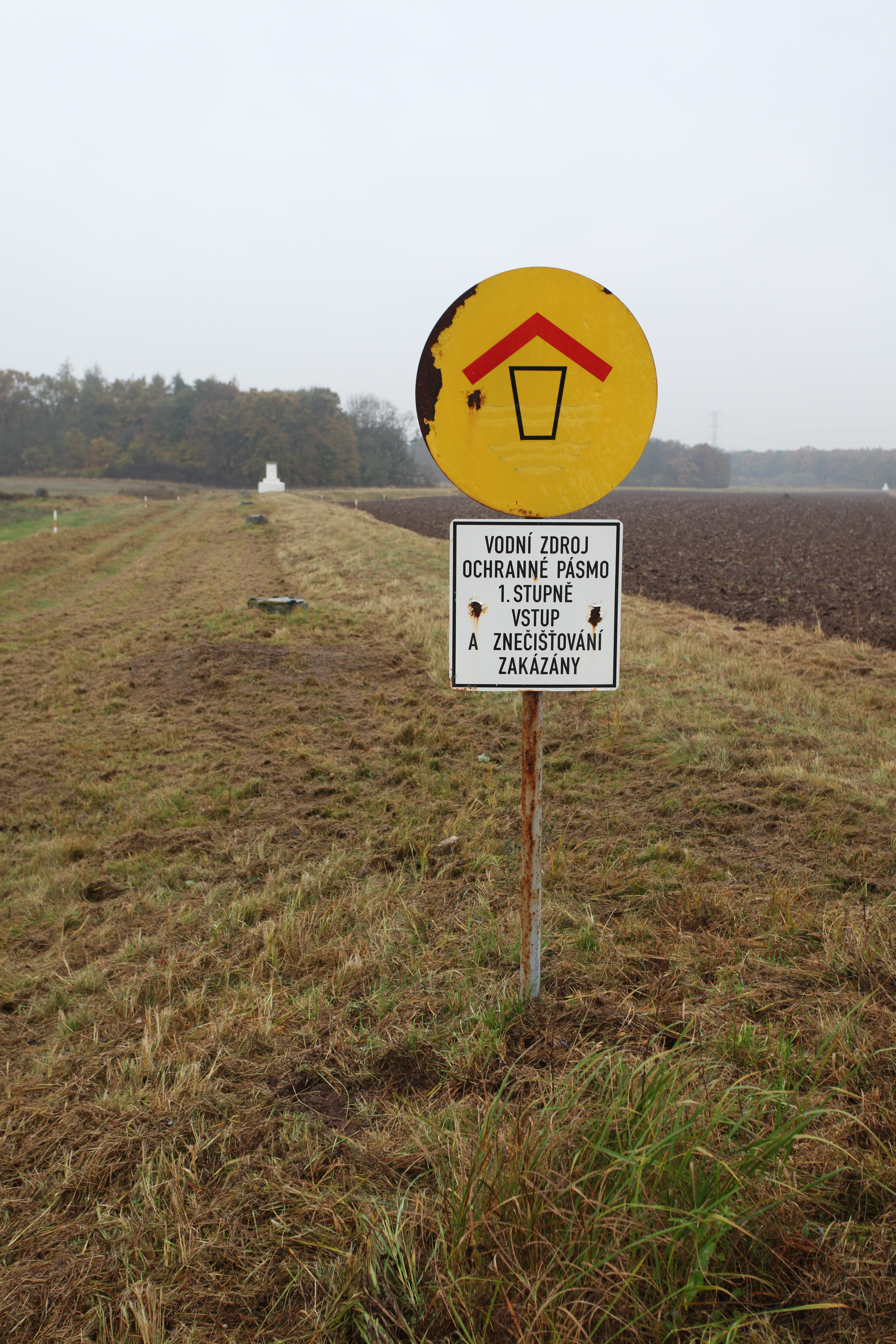 V popředí zatravněný pás se studněmi přirozené infiltrace. V úpravně vod v Káraném se tyto studně nachází ve vzdálenosti 200-300 m od řeky Jizery. Využívají faktu, že voda přirozeně prosakuje skrz okolní písky a tak se čistí. Takovýchto úseků je v okolí Jizery 7 v celkové délce 30 km. Každá sběrná studna je tvořená kameninovou rourou, která je ve spodní části po obvodu perforovaná. Uprostřed je trubka na čerpání vody, která je spojena s násoskou. Ta vytváří podtlak a tak dochází k čerpání vody. Voda z násosky teče potrubím do sběrné studny a poté přes načerpací stanici do úpravny v Káraném, kde je ošetřena chlórem. Na fotografii je pak vidět pásmo hygienické ochrany vod I. Stupně v bezprostřední blízkosti studní. V okolí, kde je umožněna zemědělská činnost v omezené míře se pak nachází pásmo hygienické ochrany vod II. stupně. Tento systém je v provozu od roku 1914 a jeho kapacita je 900-1000 l/s. Doba zdržení je asi 1 měsíc. Mocnost zdejších štěrkopísků je 8-12 m. Zdroje: Křivánek, Oldřich a Kněžek, Miroslav. 2001. Zdroje pitné vody v Káraném. Principy získávání vody v oblasti káranské vodárny. Pražské vodovody a kanalizace a.s.